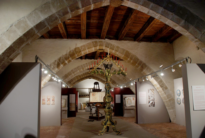 dormitorio catedral pamplona